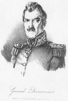 Paul Ferdinand Stanislas Dermoncourt (1771-1847), French general